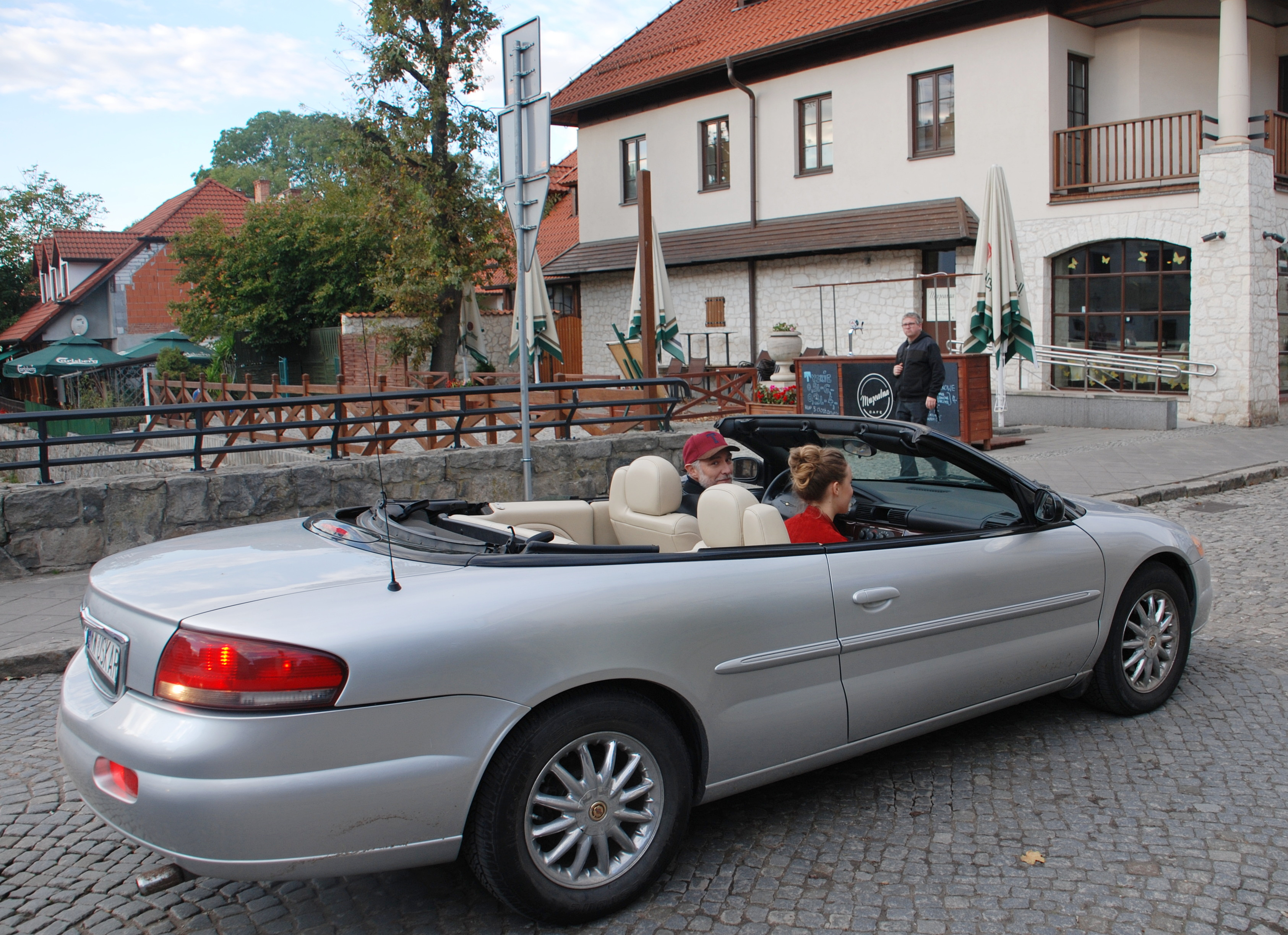 miasto Kazimierz Dolny